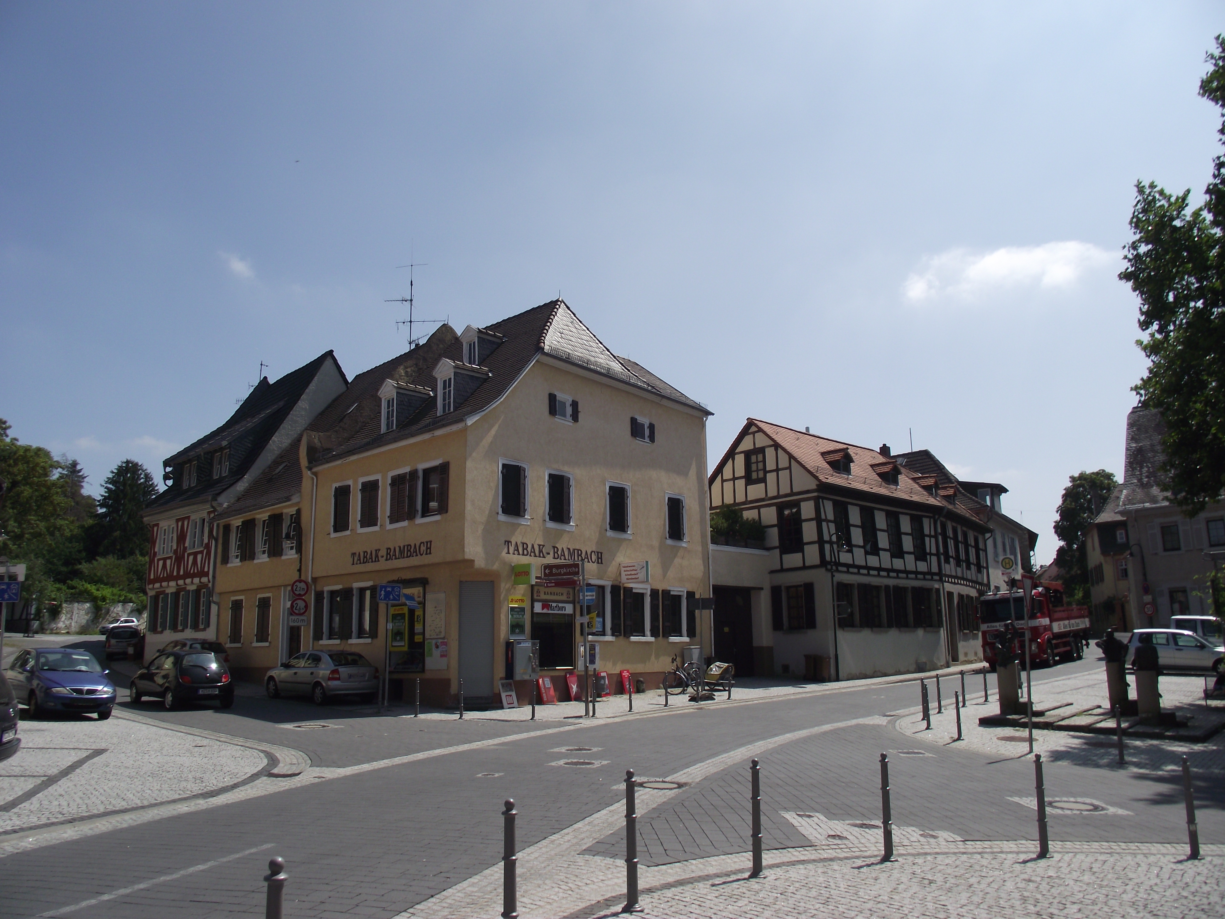 Östliche Bebauung am Marktplatz in Ober-Ingelheim